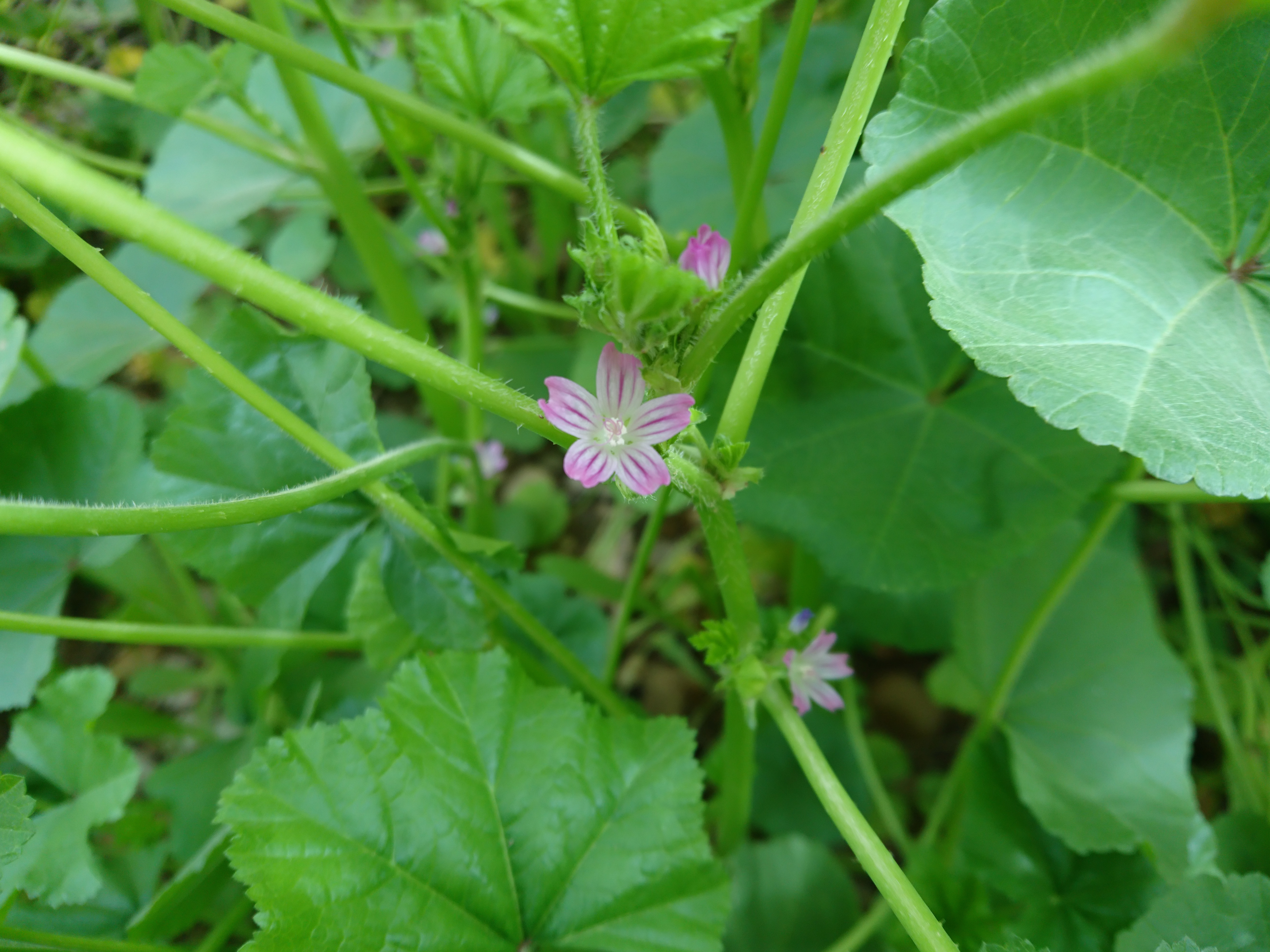 پنیرک یا توله، بهبهان